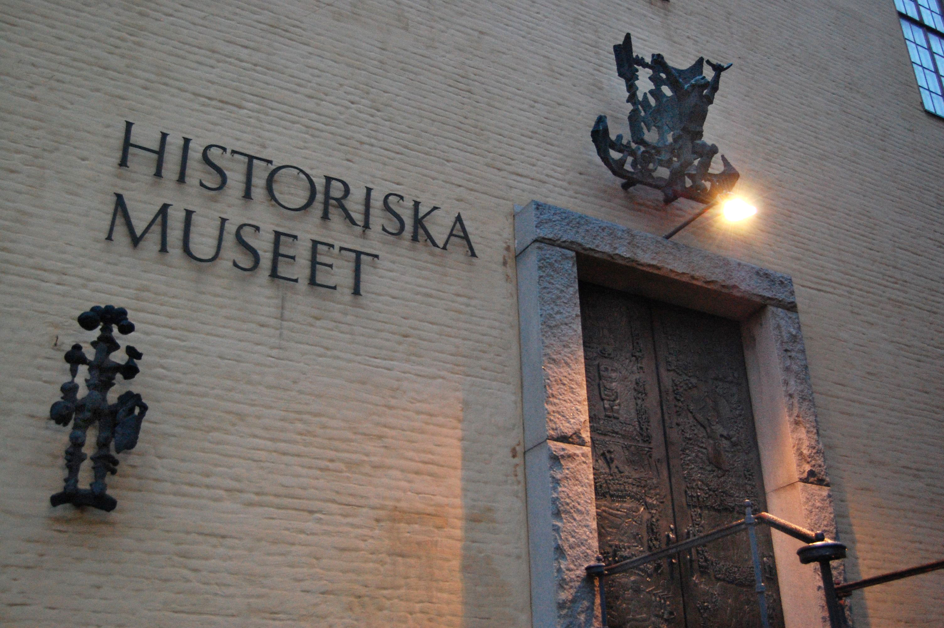 Historiska museet in Stockholm, Sweden. Bronze gates and sculptures by Bror Marklund.